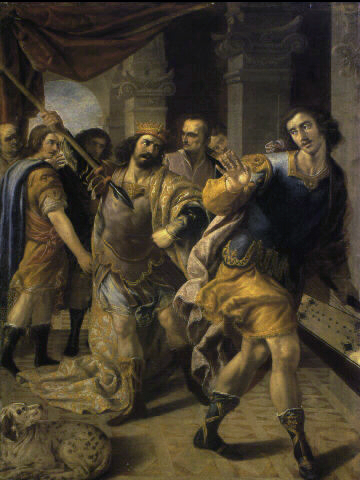 David before Saul